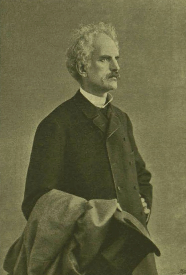 Lipthay Béla magyar császári és királyi kamarás, fölművelésügyi miniszteri osztálytanácsos, főrendiházi politikus. Vasárnapi Ujság 1899. május 21.